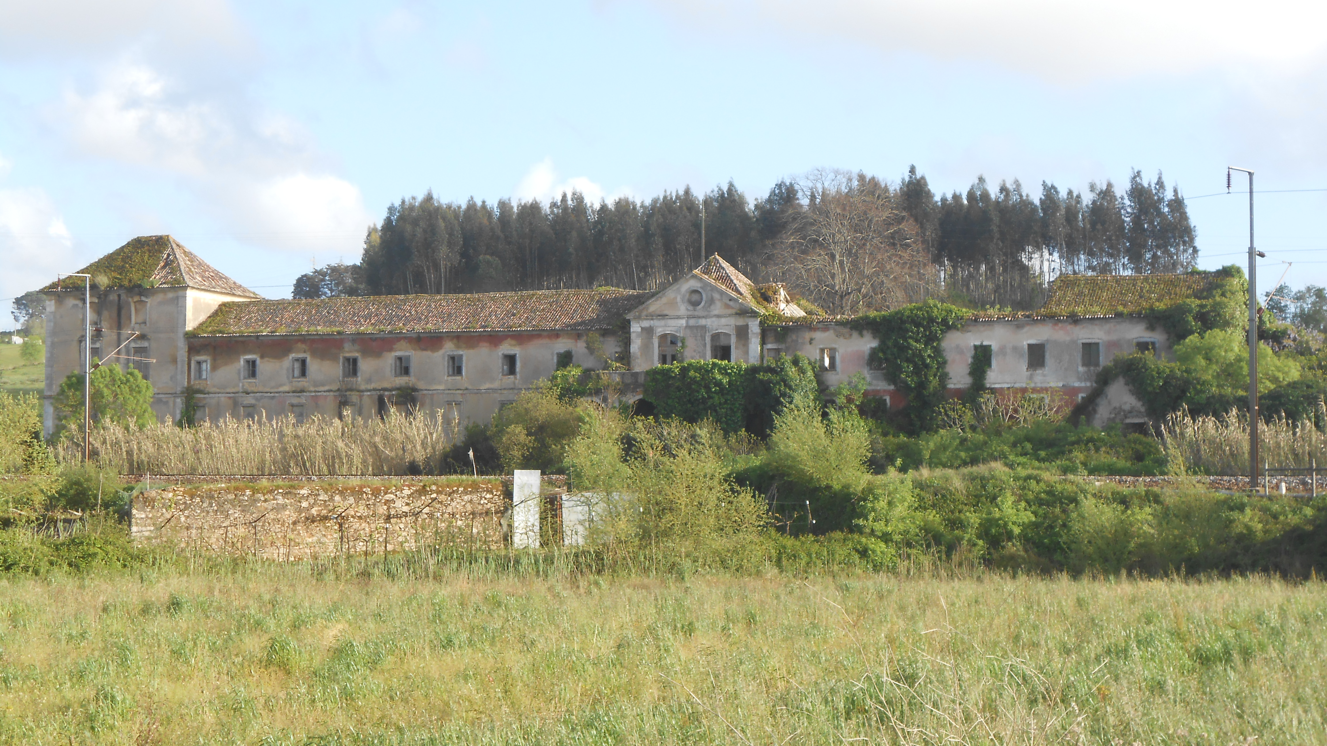 Das 1580 errichtete, denkmalgeschützte Kloster "Mosteiro de Verride", auch "Convento de Almiara".